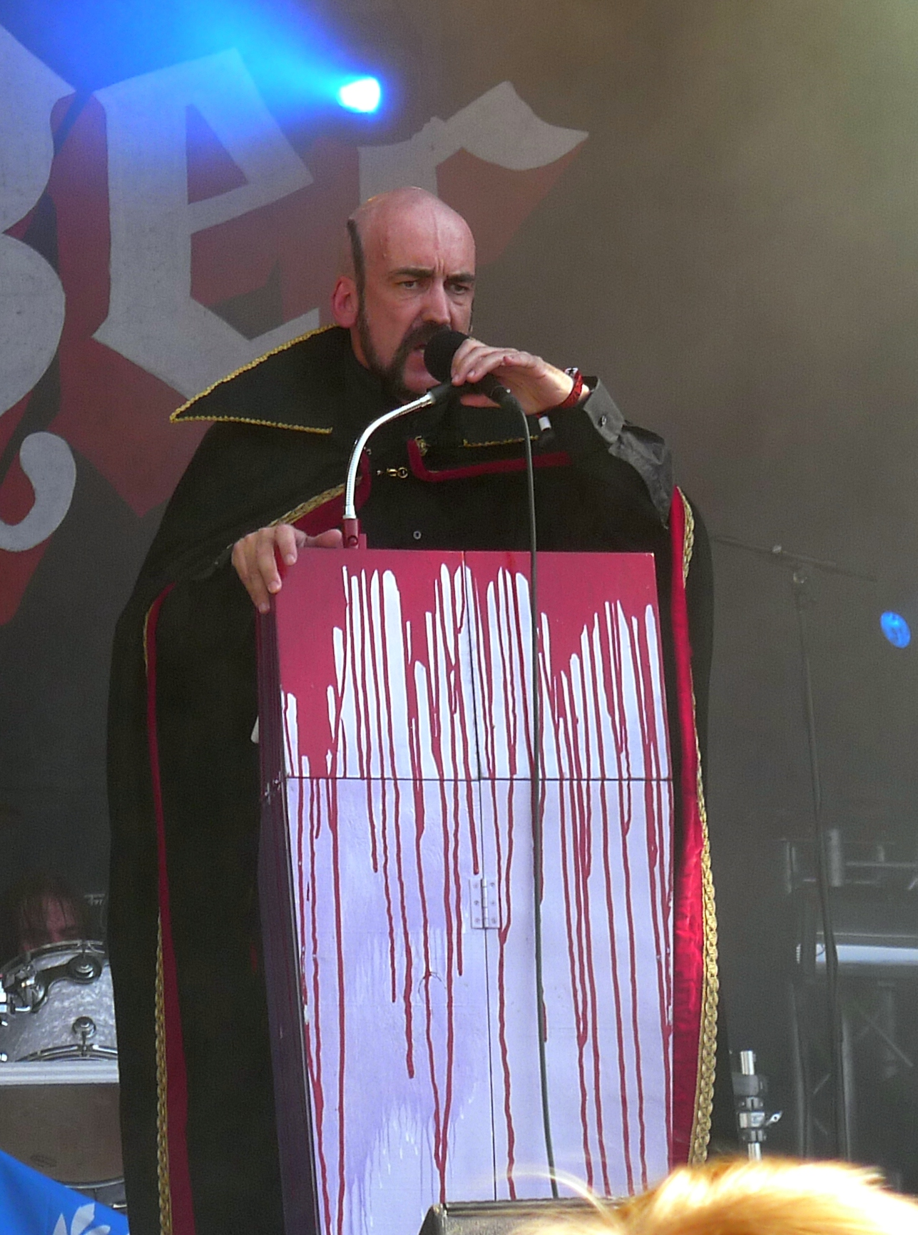 Bulldozer live am Tuska Open Air 2011